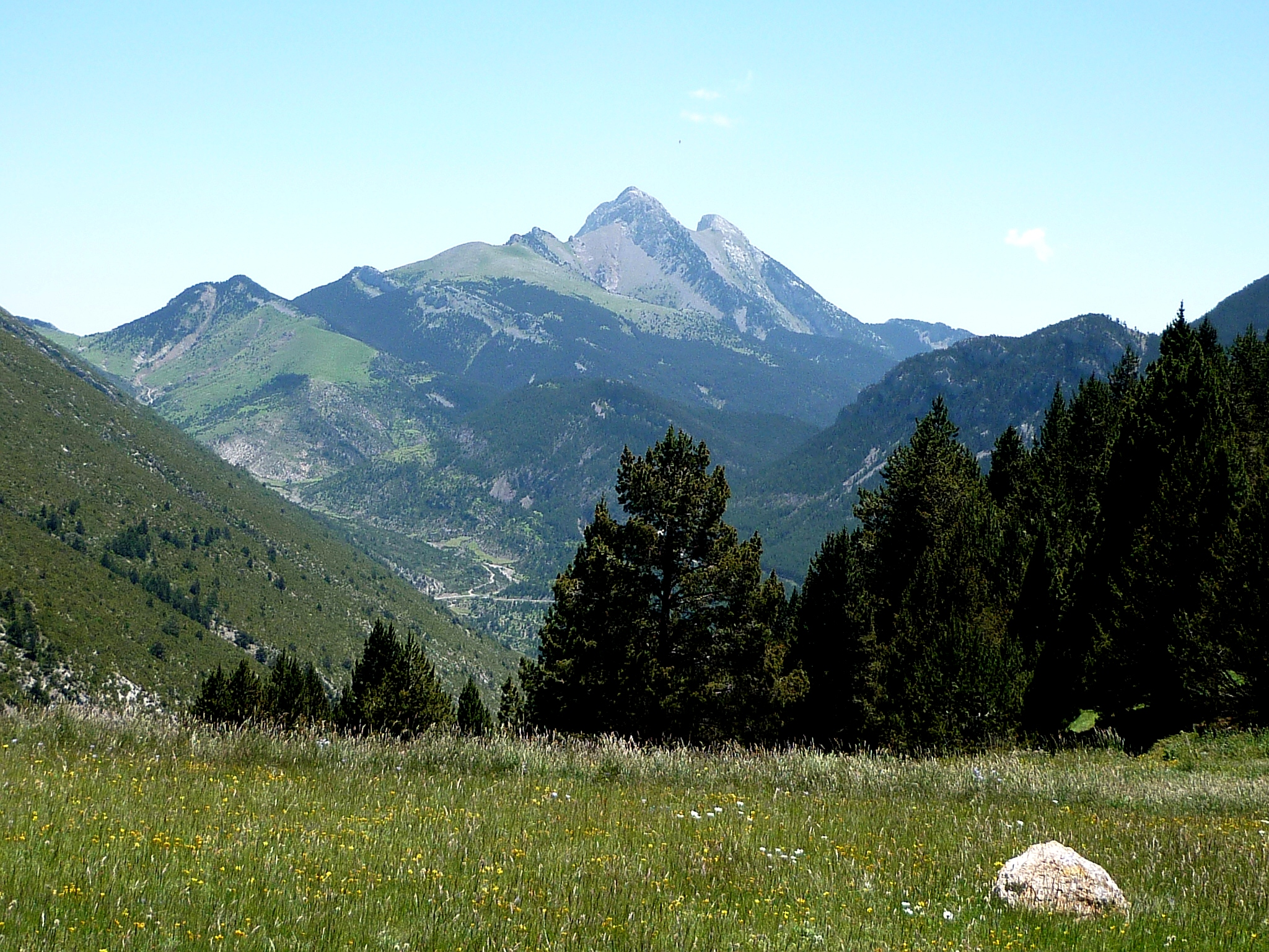 Des del Coll de Jovell es pot admirar una bella perspectiva del Pedraforca This is a a photo of an emblematic summit in Catalonia, Spain, with id: CE-278085006 This is a a photo of a geologic site or geotope in Catalonia, Spain, with id: IEIGC-145